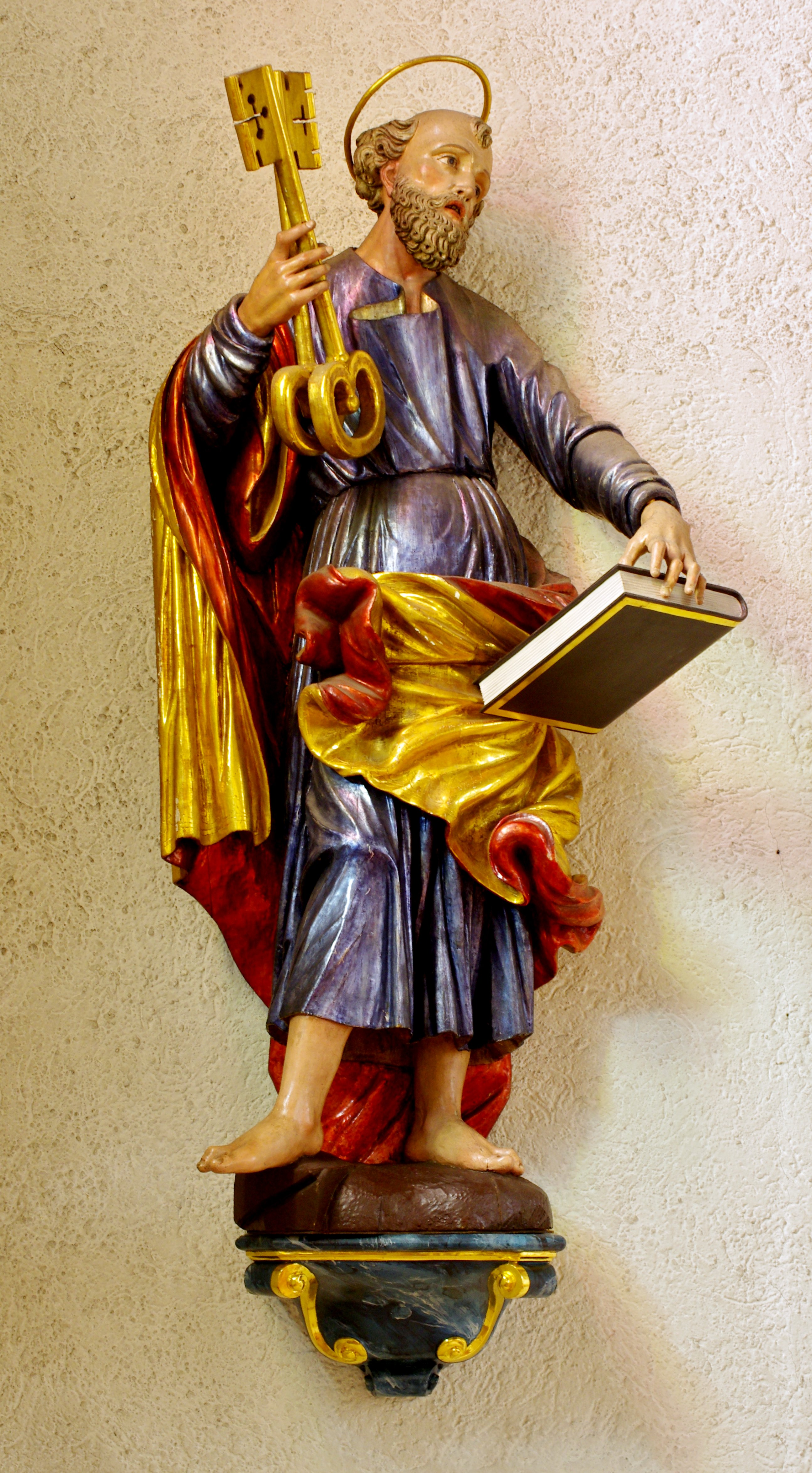 Die Pfarrkirche St. Martin in Vöhrenbach